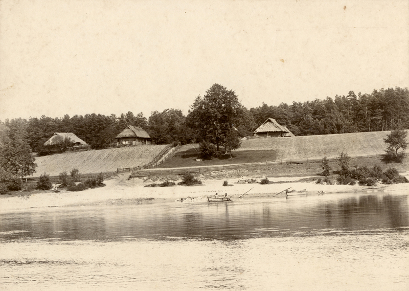 Balbieriškis, 1904 m.